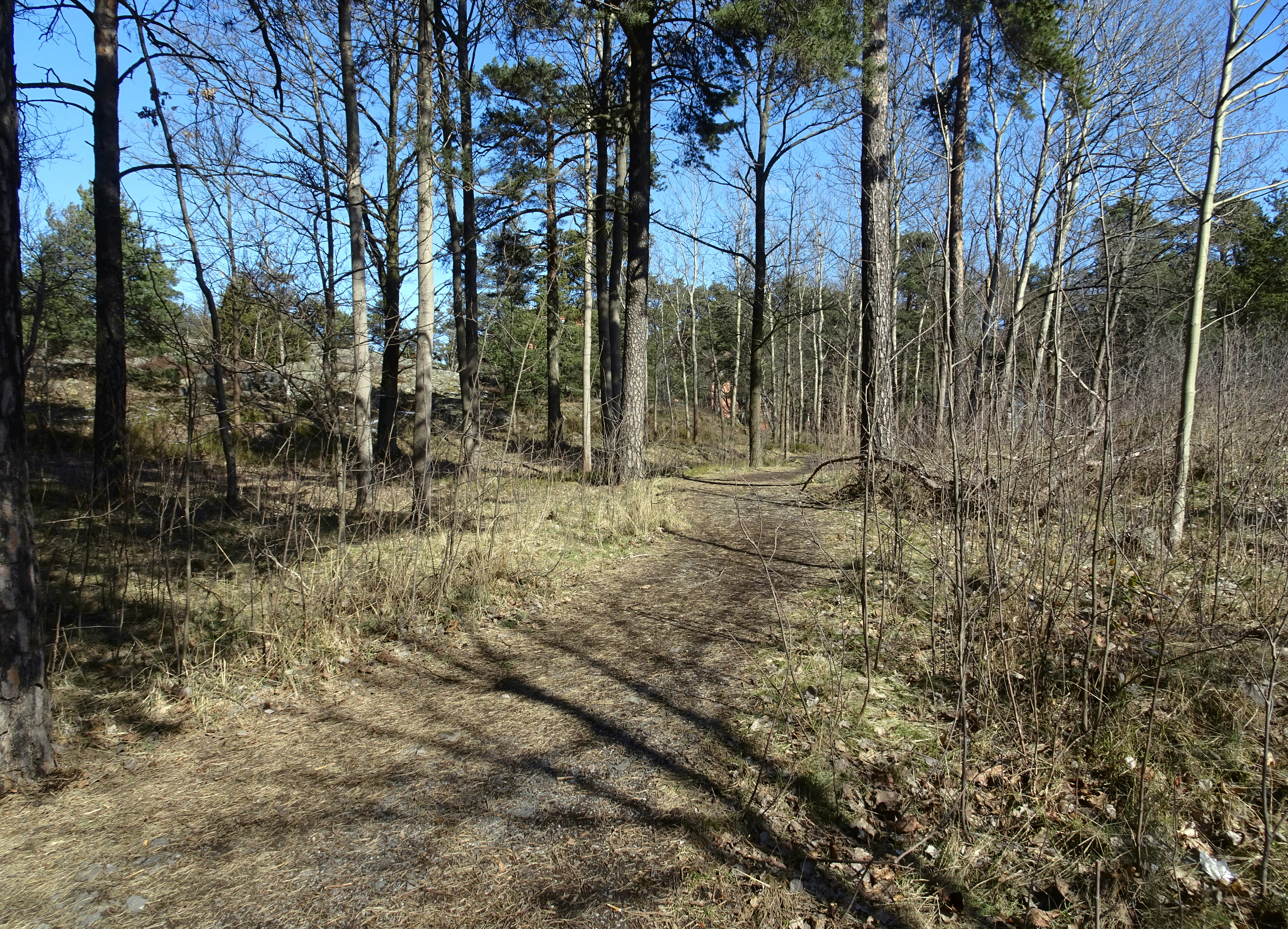 Zachrisbergs tomt, Årstaberg